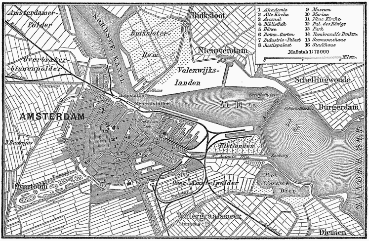 Situationsplan von Amsterdam